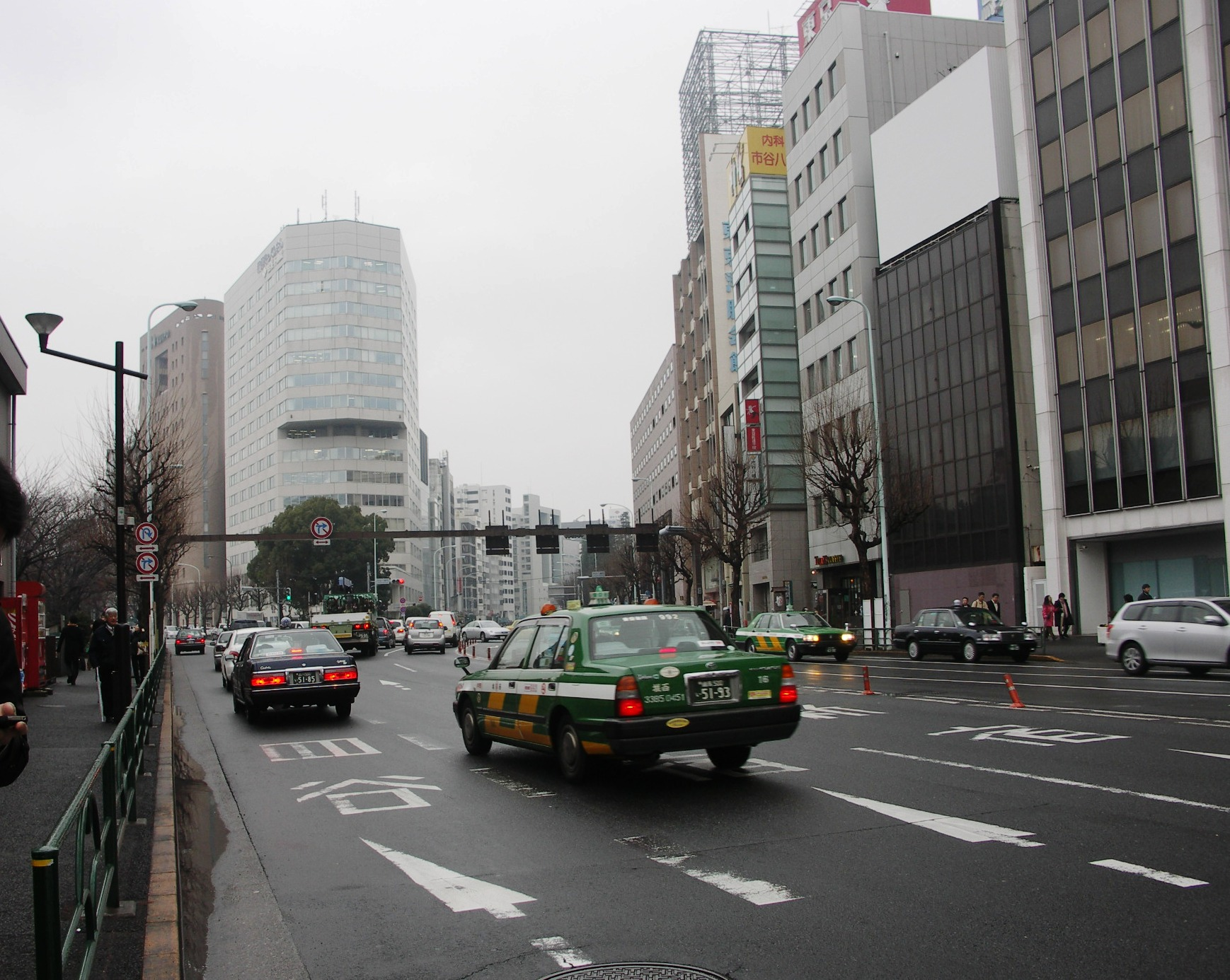 東京都新宿区市谷八幡町